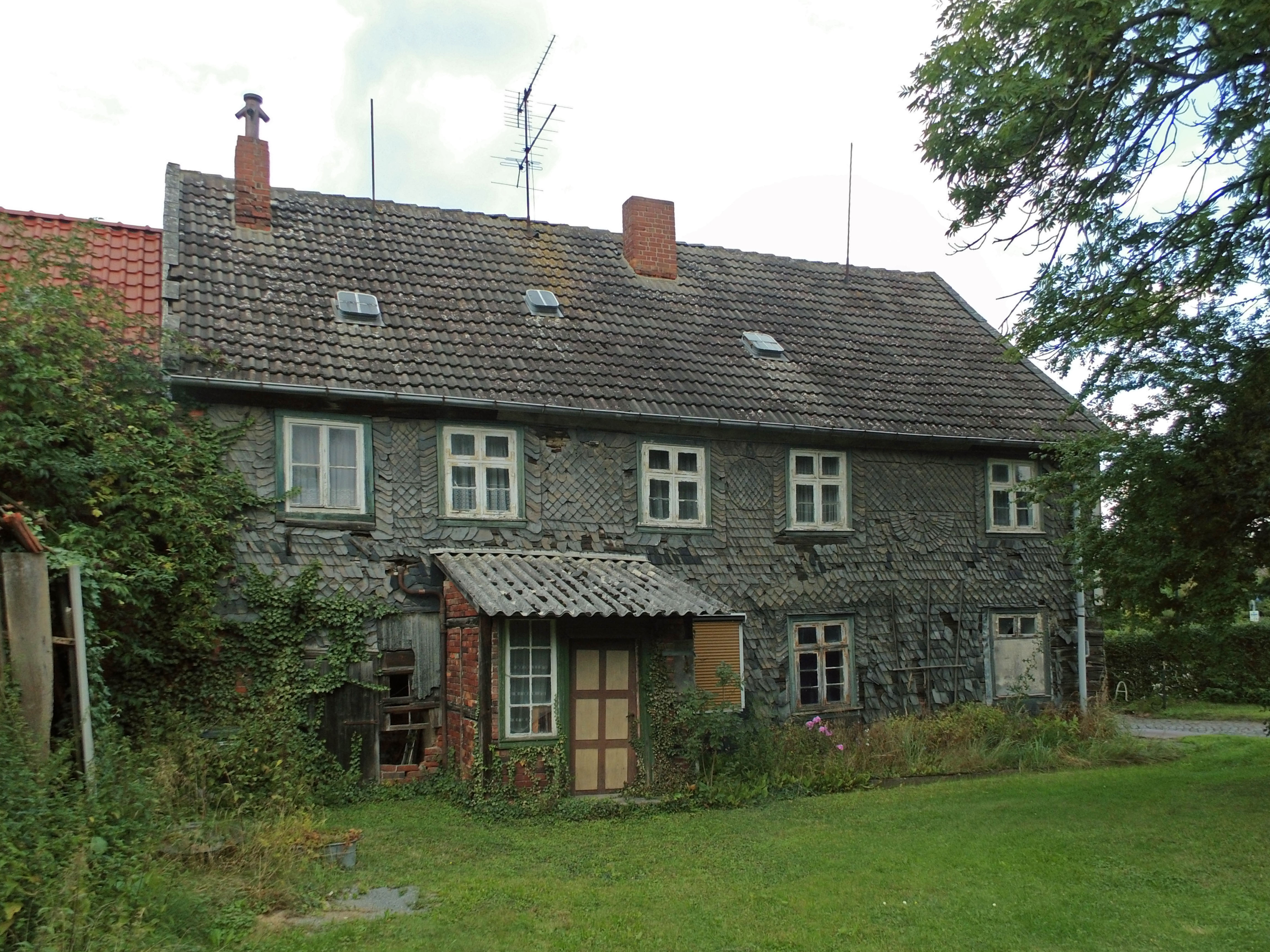 Gebäude in Weferlingen, in dem sich von ca. 1911/12 bis ca. 1928/29 eine katholische Kapelle befand.